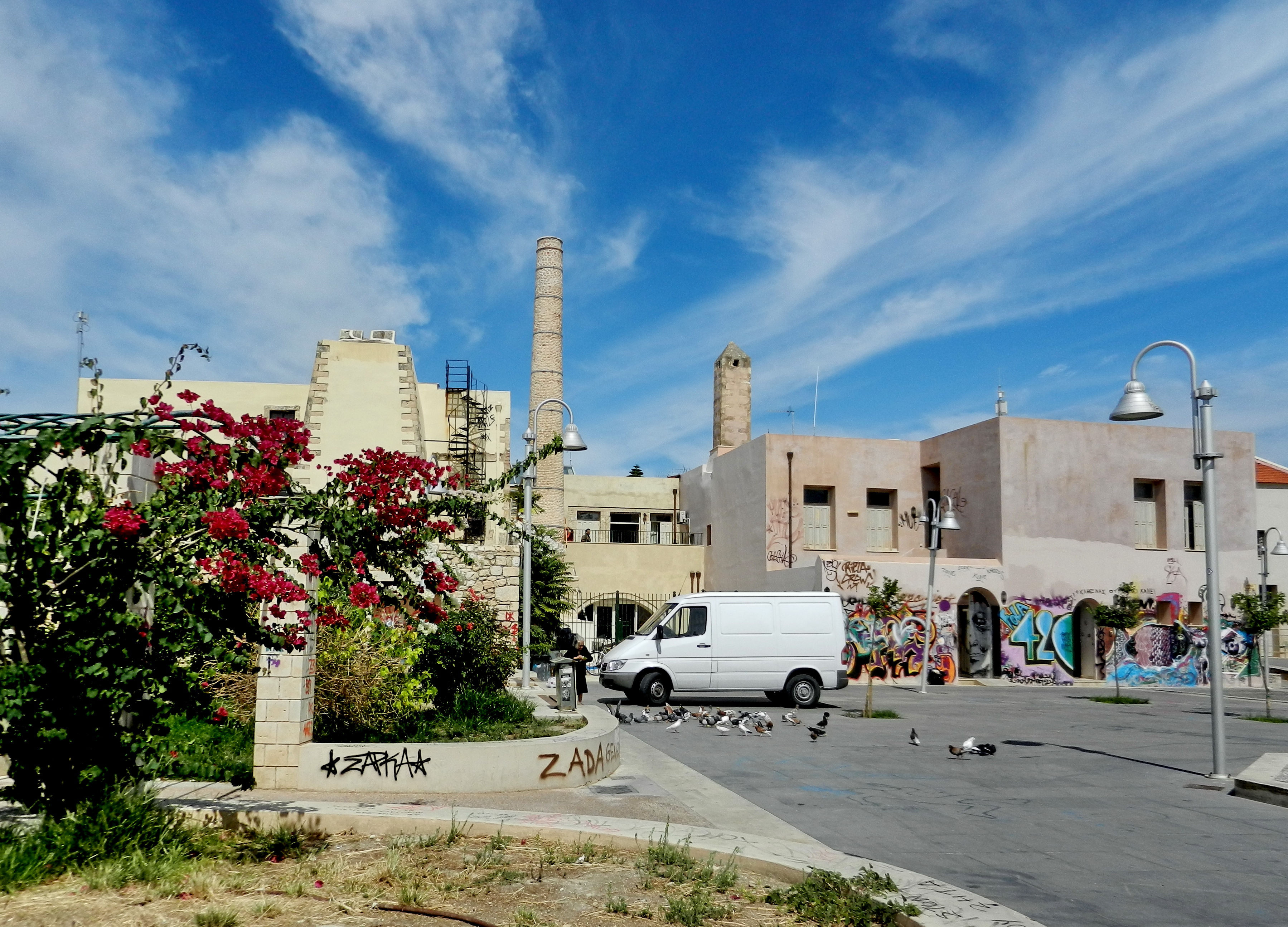 Rethymno, Mikrasiaton Square - Πλατεία Μικρασιατών, Ρέθυμνο